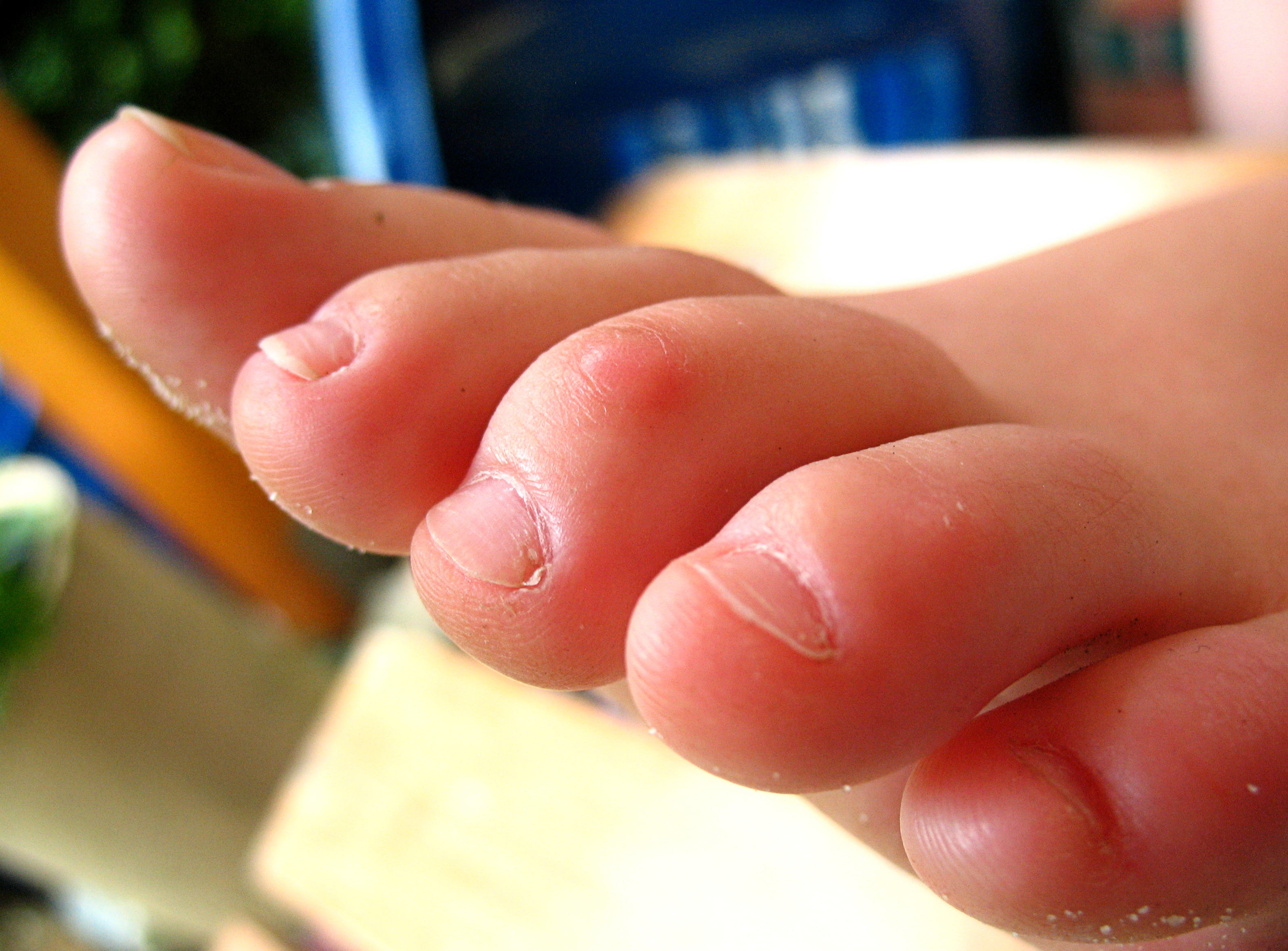 Hammerzehe an der mittleren Zehe des linken Fußes